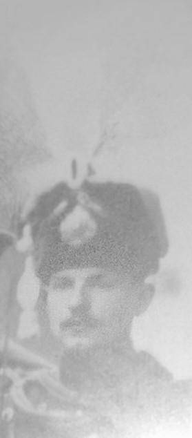 Rittmeister Günther von Pogrell im Jahre 1914, Bergfest 4. Eskadron, Leib-Garde-Husaren-Regiment